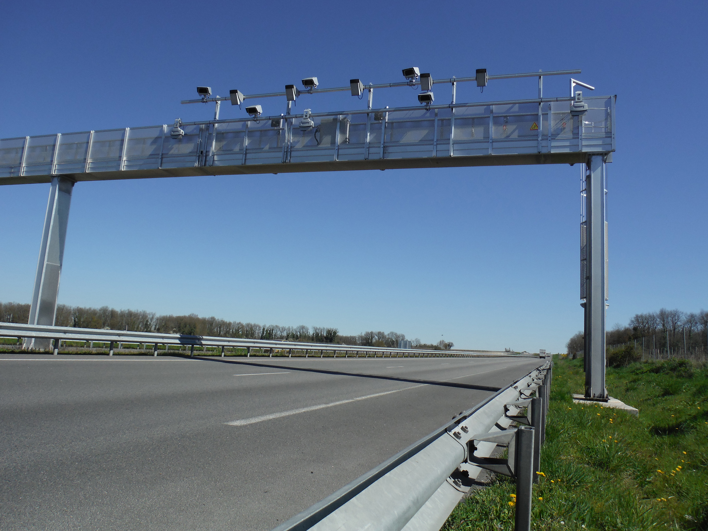 Portique Écotaxe. Coordonnées GPS : 45.5029 -0.119369